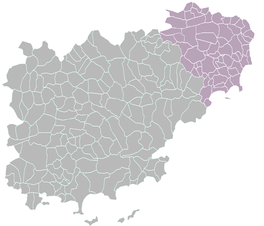 Division du Var en 1860